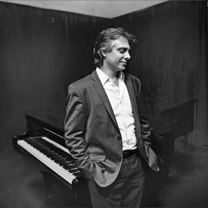 Bruno Belthoise en studio